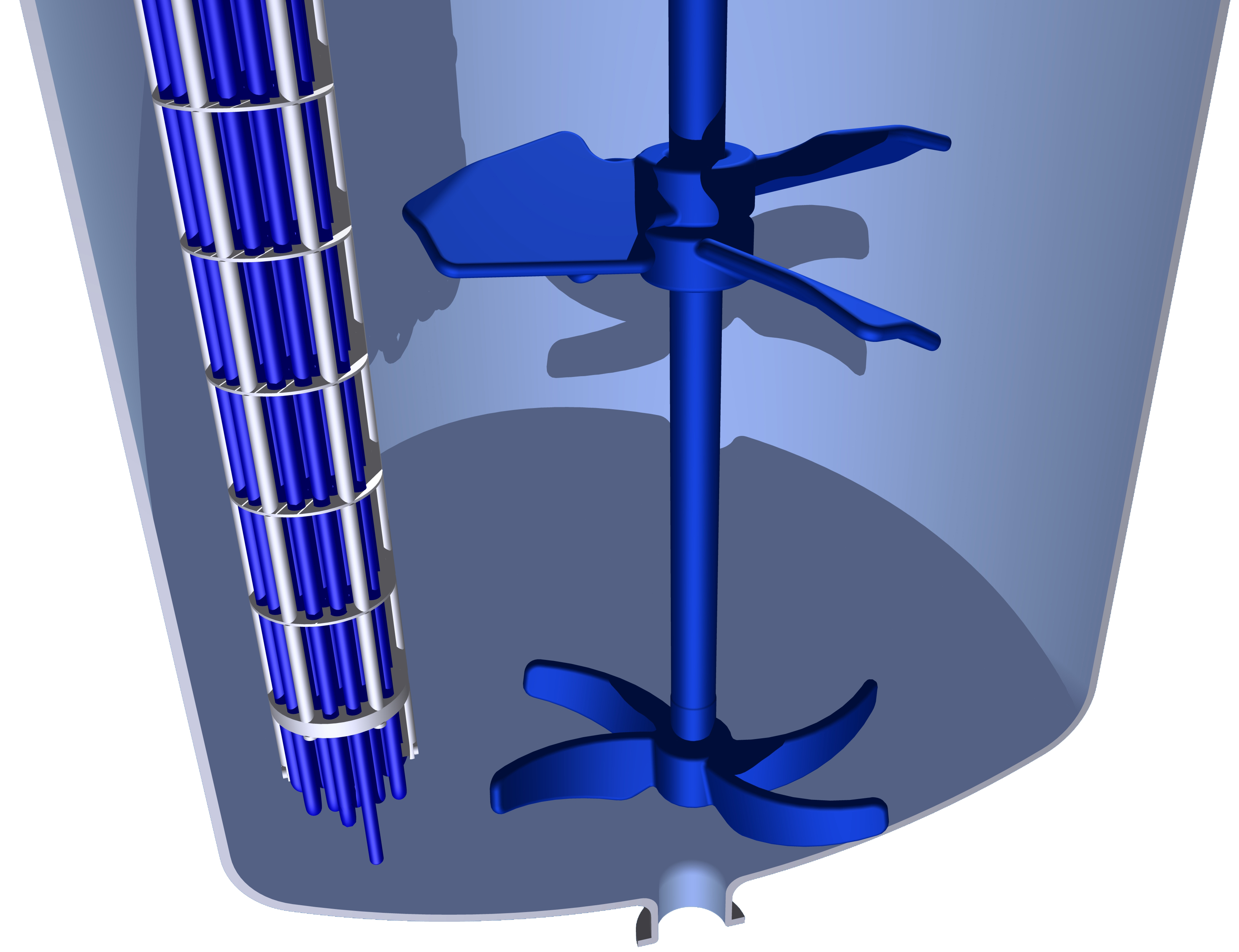 Einbau in einem emaillierten Rührbehälter